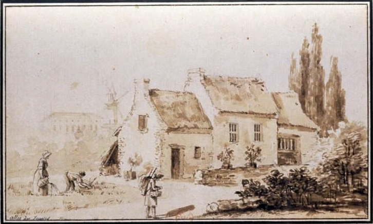 L'allée des Veuves, actuelle avenue Montaigne, près du rond-point des Champs-Élysées, au 18e siècle. Dessin à la plume et lavis à l'encre brune, 11 x 18,5 cm, en provenance de la collection Hippolyte Destailleur.